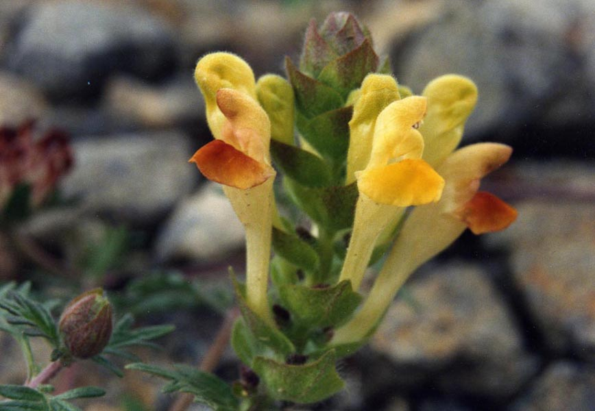 Scutellaria orientalis var. pinnatifida